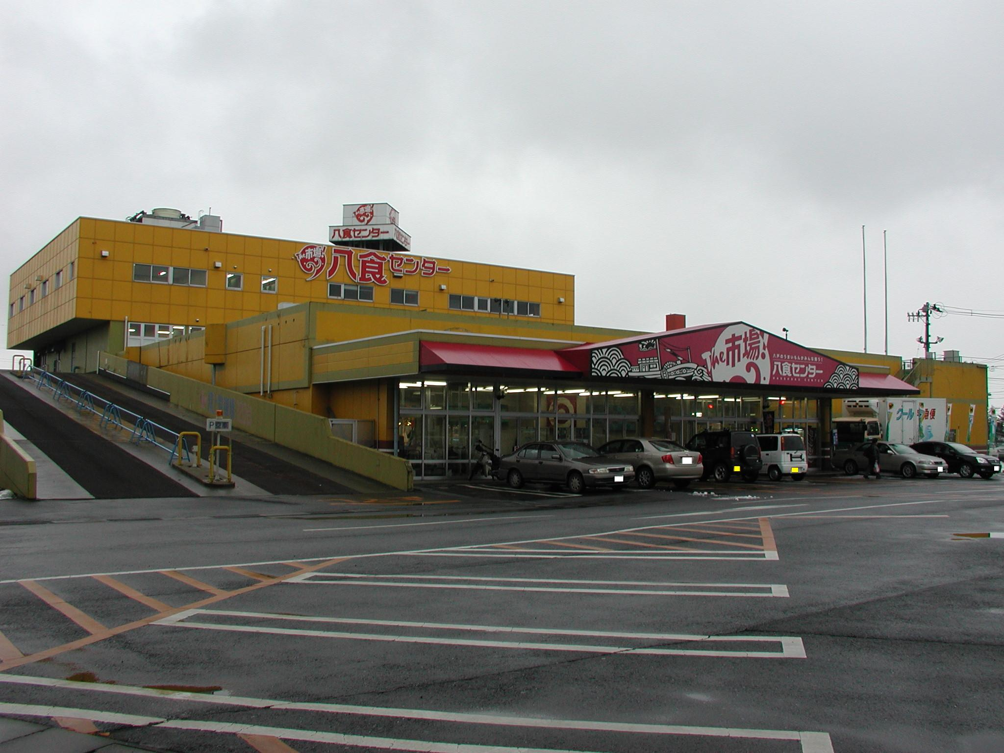 八食センター：市場棟北口※：自動車ナンバー部分に隠し加工処理済み